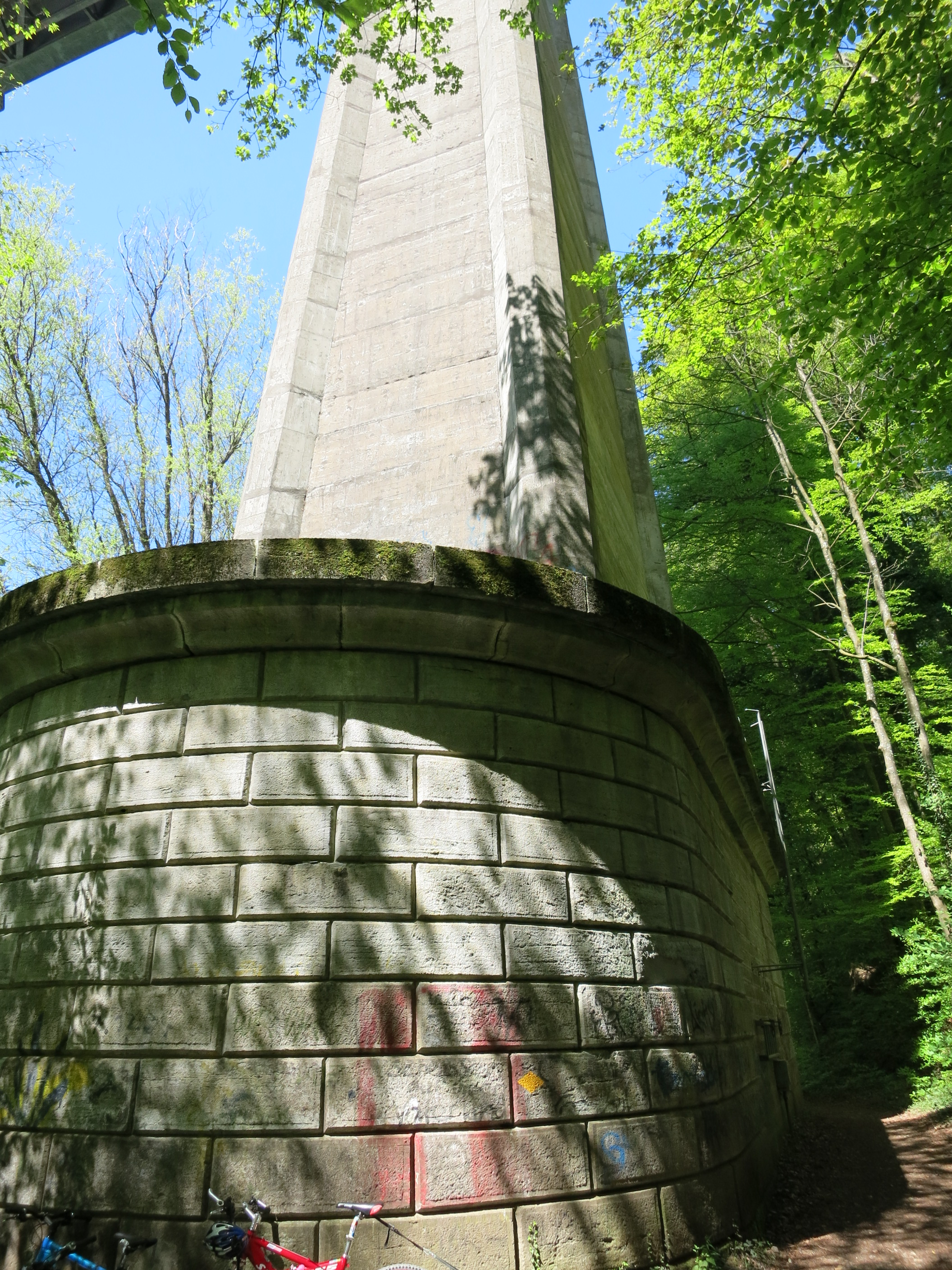 Reussbrücke, Mellingen AG, Schweiz